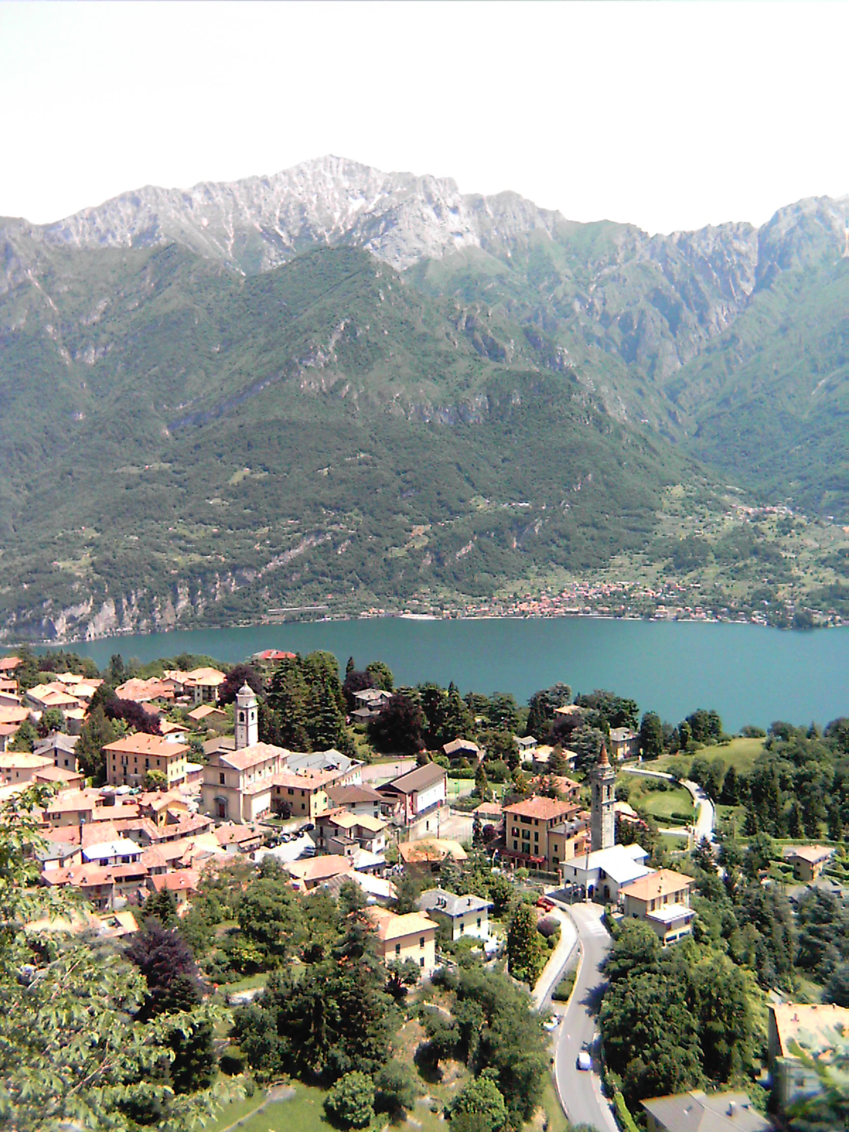 Civenna panorama